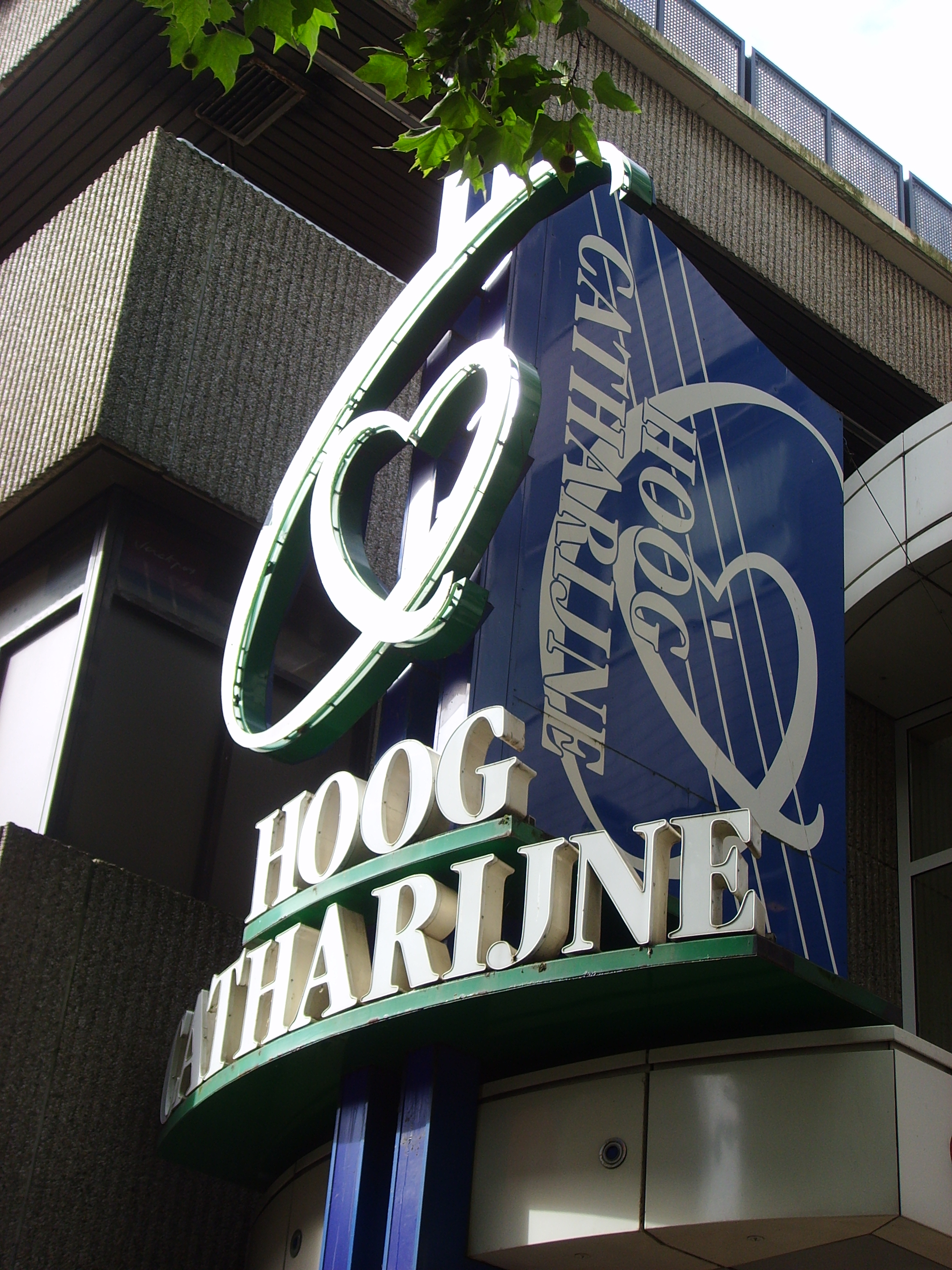 Logo boven de ingang van winkelcentrum Hoog Catharijne aan het Vredenburgplein in de binnenstad van Utrecht